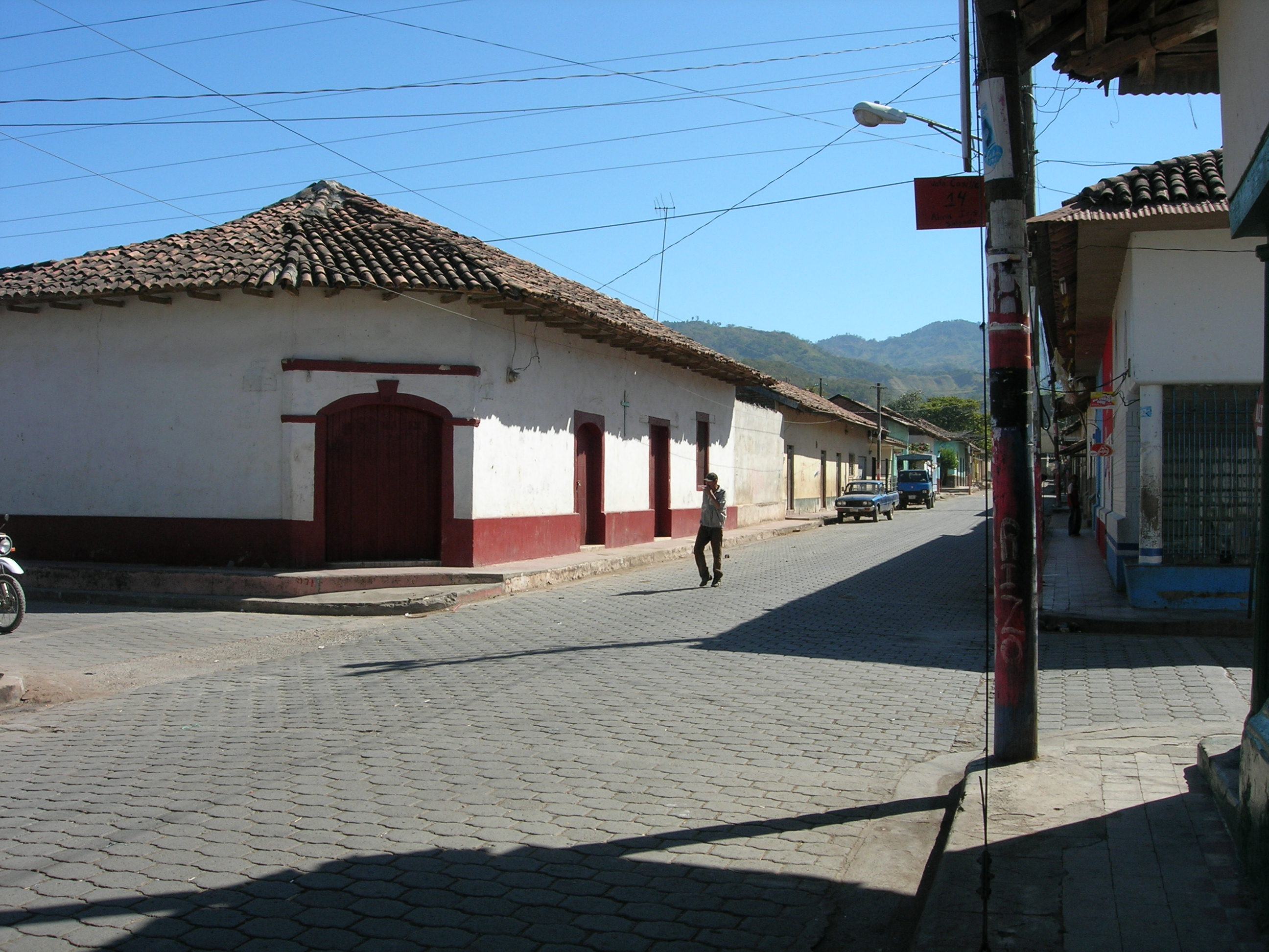 El Sauce, Nicaragua